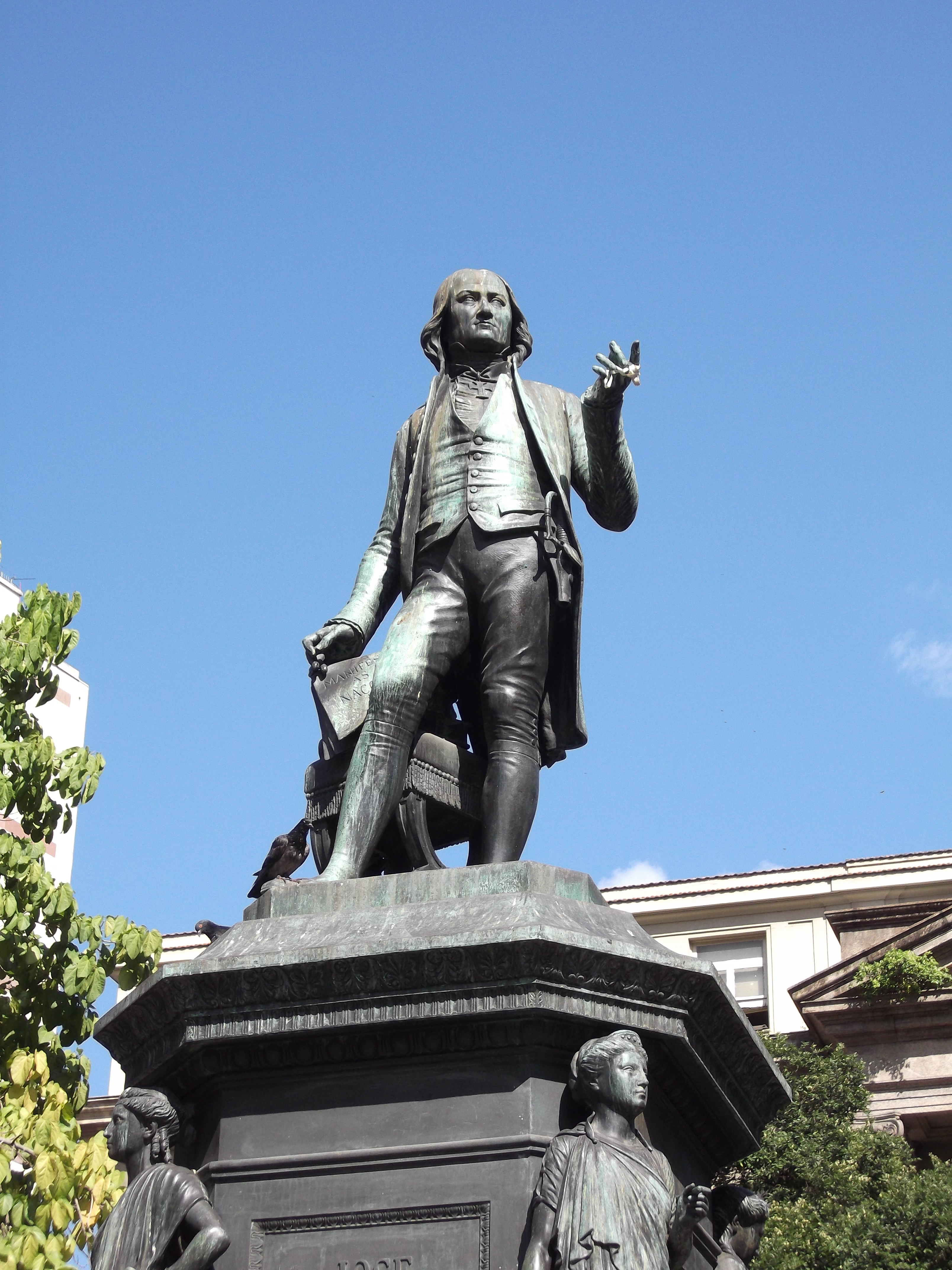 Estátua de José Bonifácio (cidade do Rio de Janeiro, Brasil)